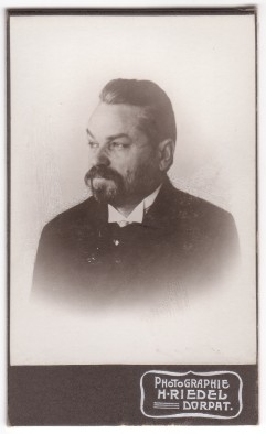 Pjotr Andrejevitš Poljakov